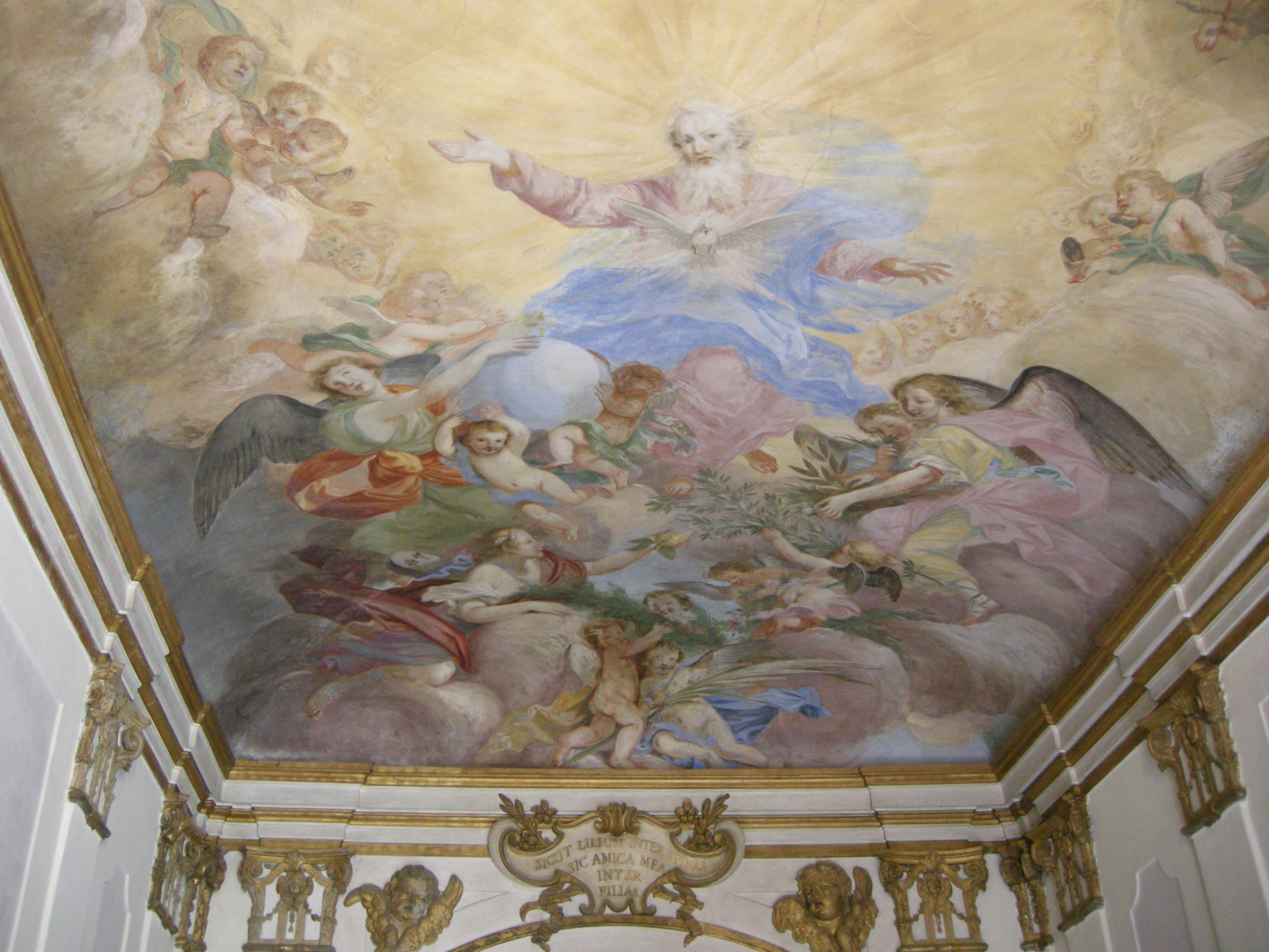 Santa maria a candeli, cappellina di agostino veracini